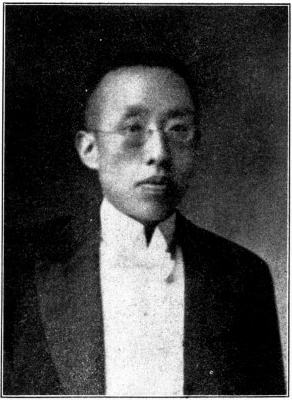 陳國祥，中華民國政治人物